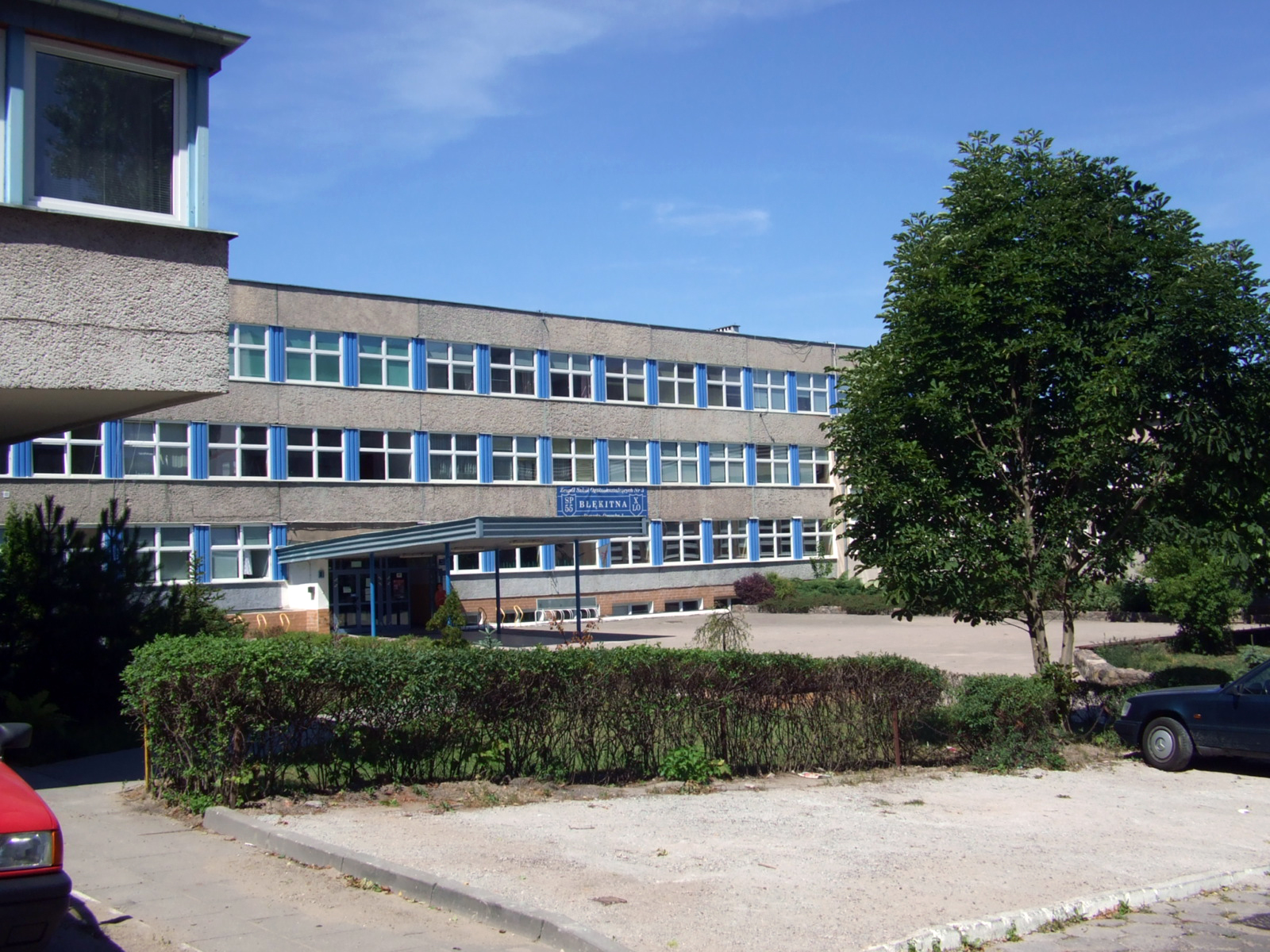 ZSO nr 3 w Szczecinie